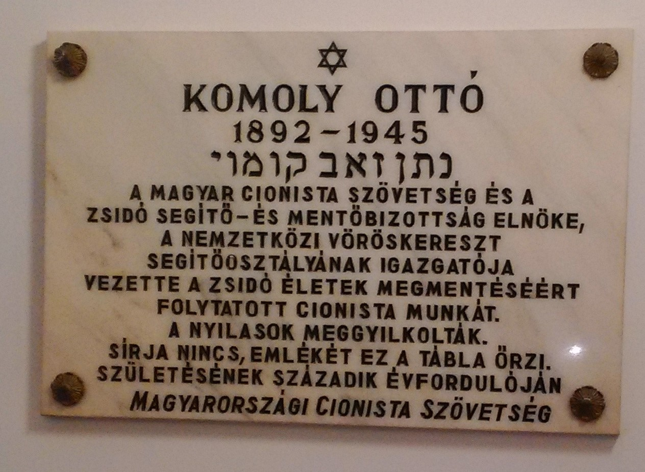 שלט הנצחה במוזיאון היהודי בבודפשט